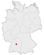 Lage von Stuttgart in Deutschland